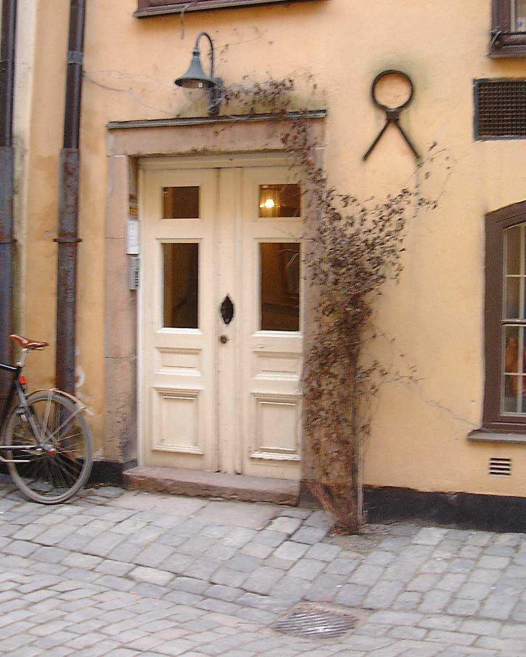 6, Drakens Gränd (Castor 10), Gamla stan, Stockholm.